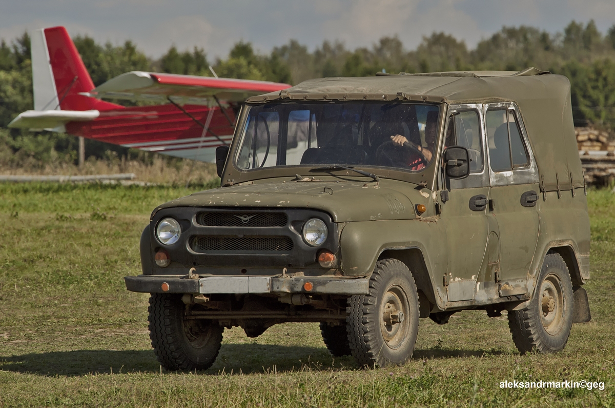 UAZ-469